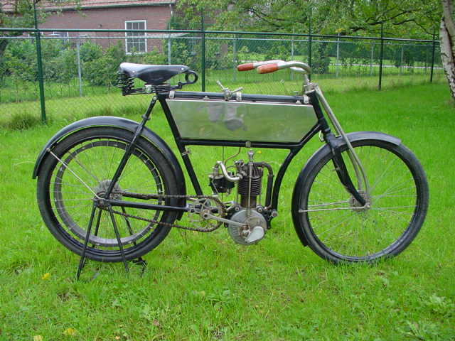 Toestemming van Yesterdays Antique Motorcycles (